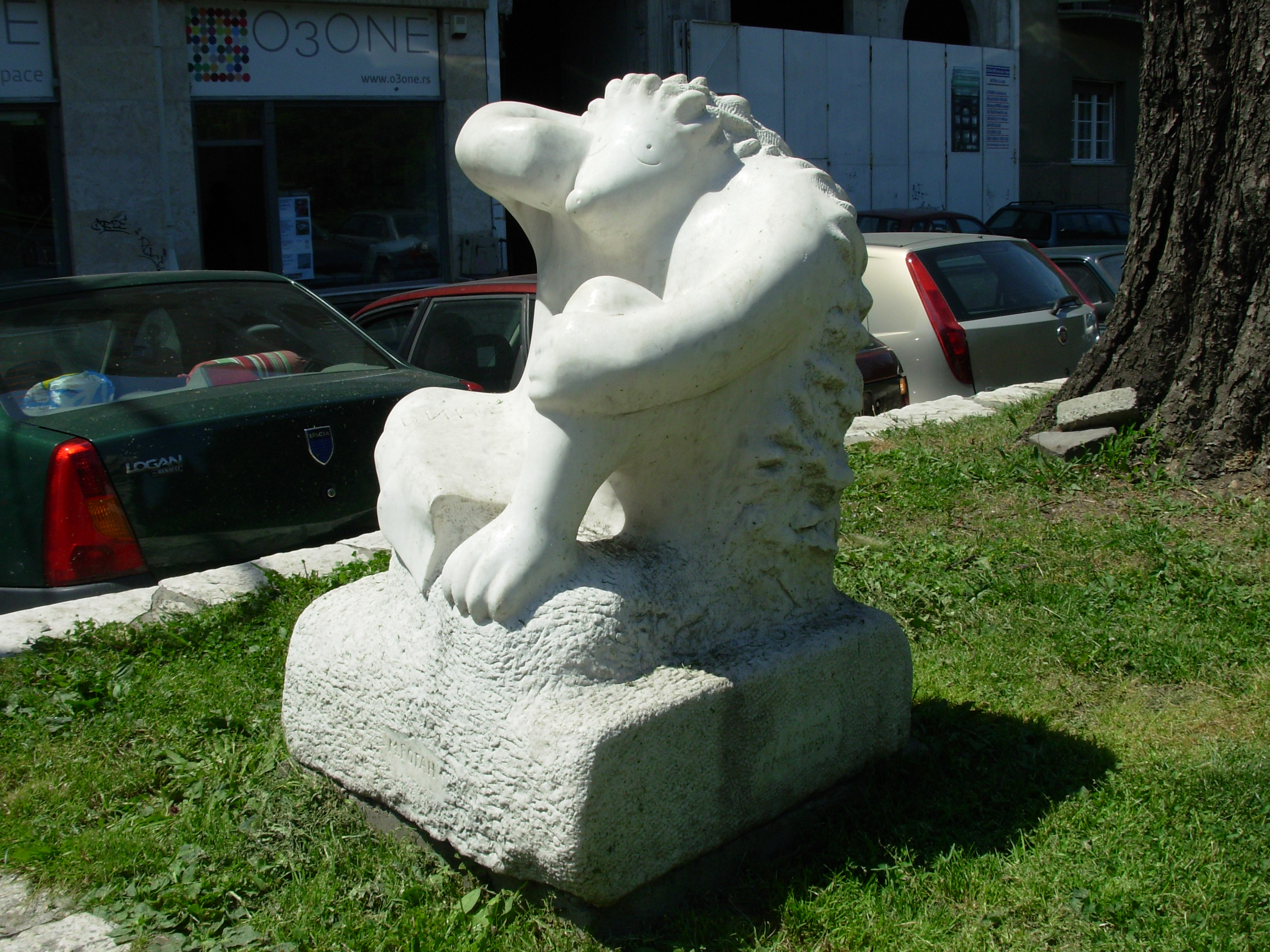 "Ошишани јеж" скулптура у Пионирком парку у Београду. Сликао Голдфингер